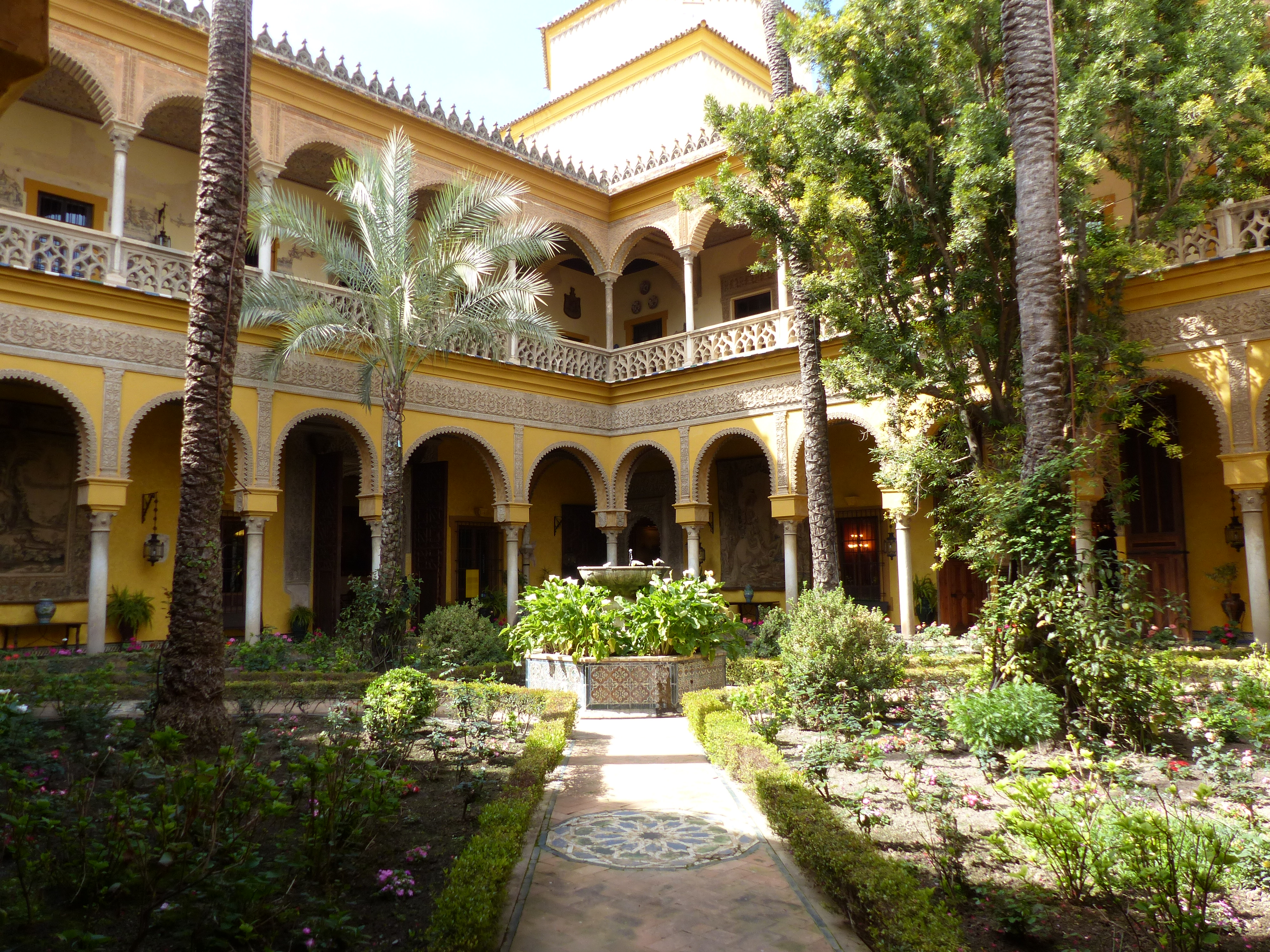 Patio central del Palacio de las Dueñas (Sevilla).